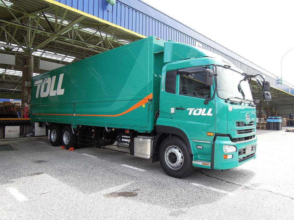 トールエクスプレスジャパンの支店にて